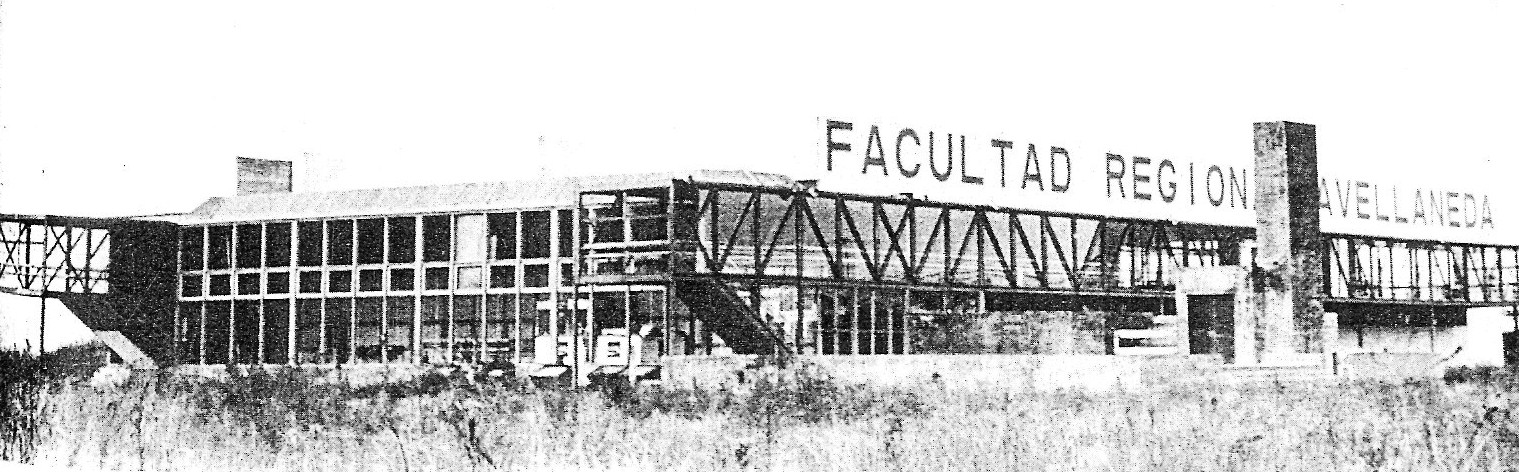 Edificio para la Facultad Regional Avellaneda de la Universidad Tecnológica Nacional. Arquitectos: Baudizzone-Erbin-Lestard-Varas (1966).